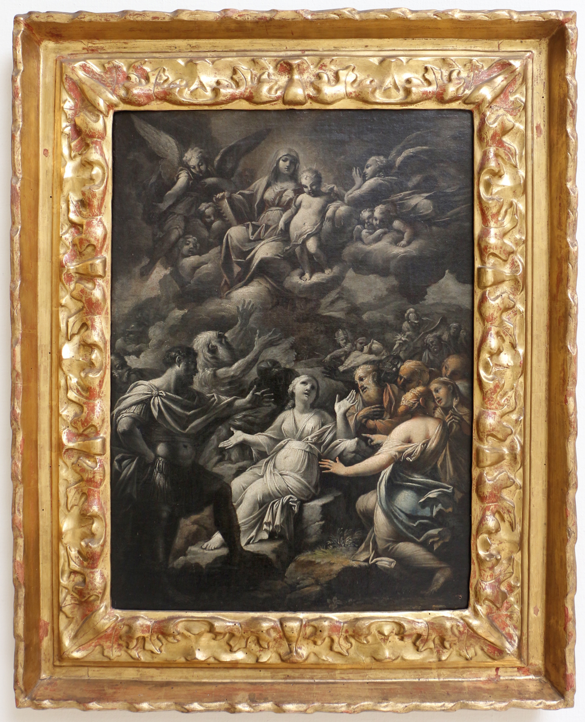 madonna col bambino in gloria e santititle QS:P1476,it:"madonna col bambino in gloria e santi" label QS:Lit,"madonna col bambino in gloria e santi"